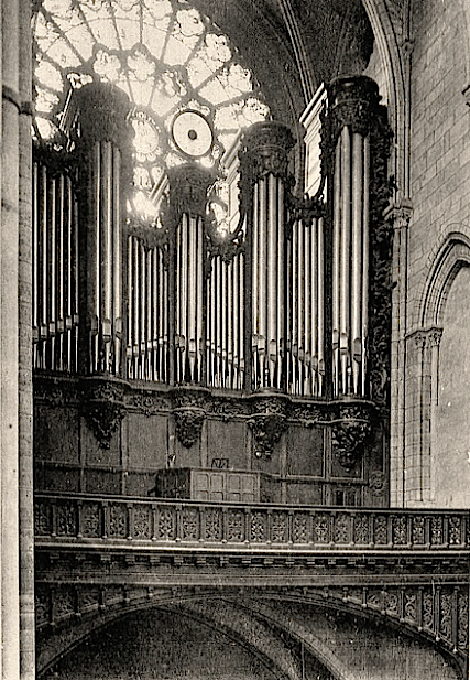 Buffet du grand orgue de la cathédrale Notre-Dame de Paris au XXe siècle